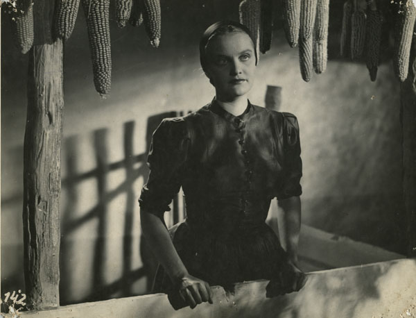 Tornácon álló nő feje fölött, felakasztott kukorica szárad (Tolnay Klári)